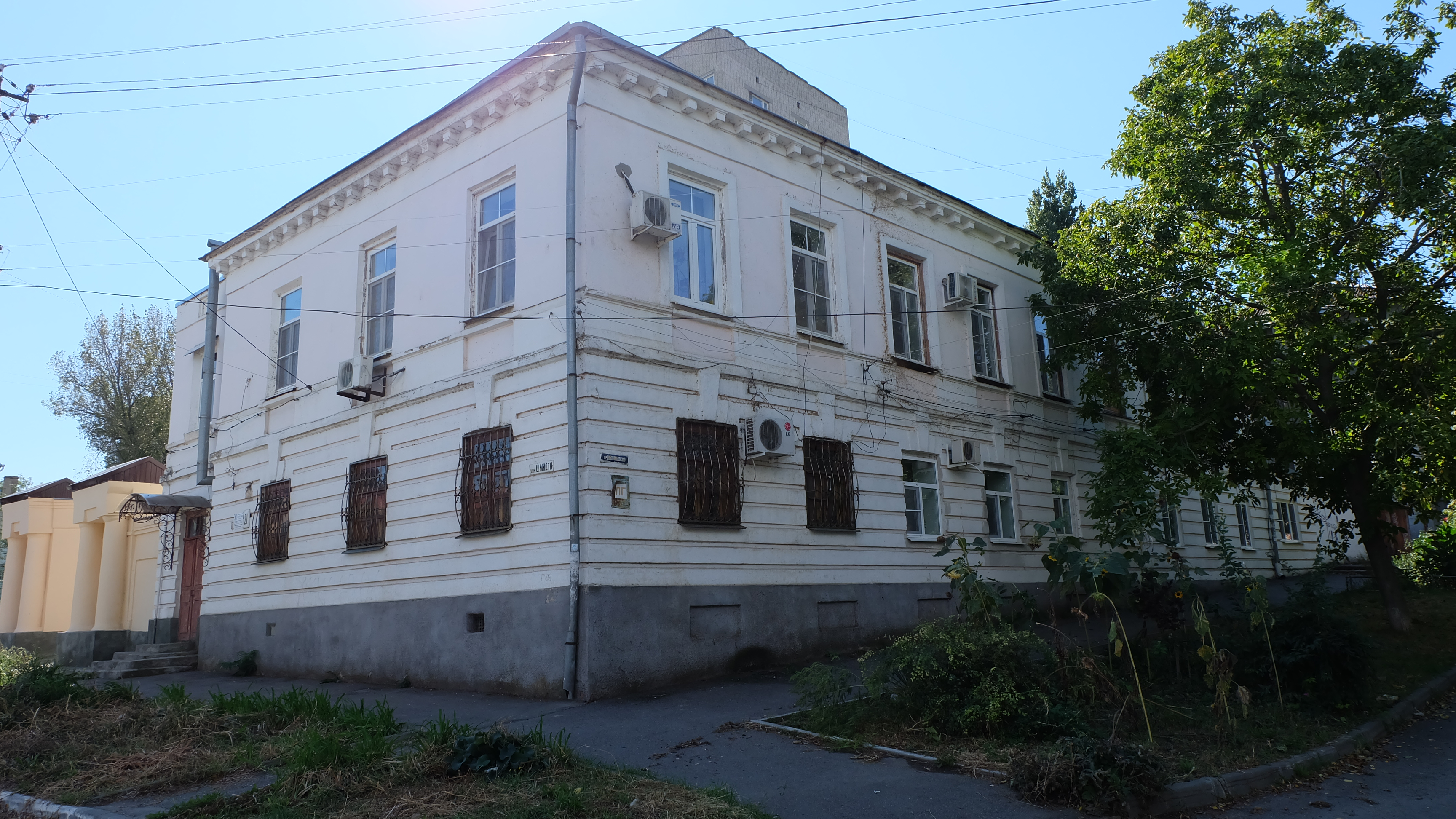 Жилой дом: улица Шмидта, 21, Таганрог, Ростовская область